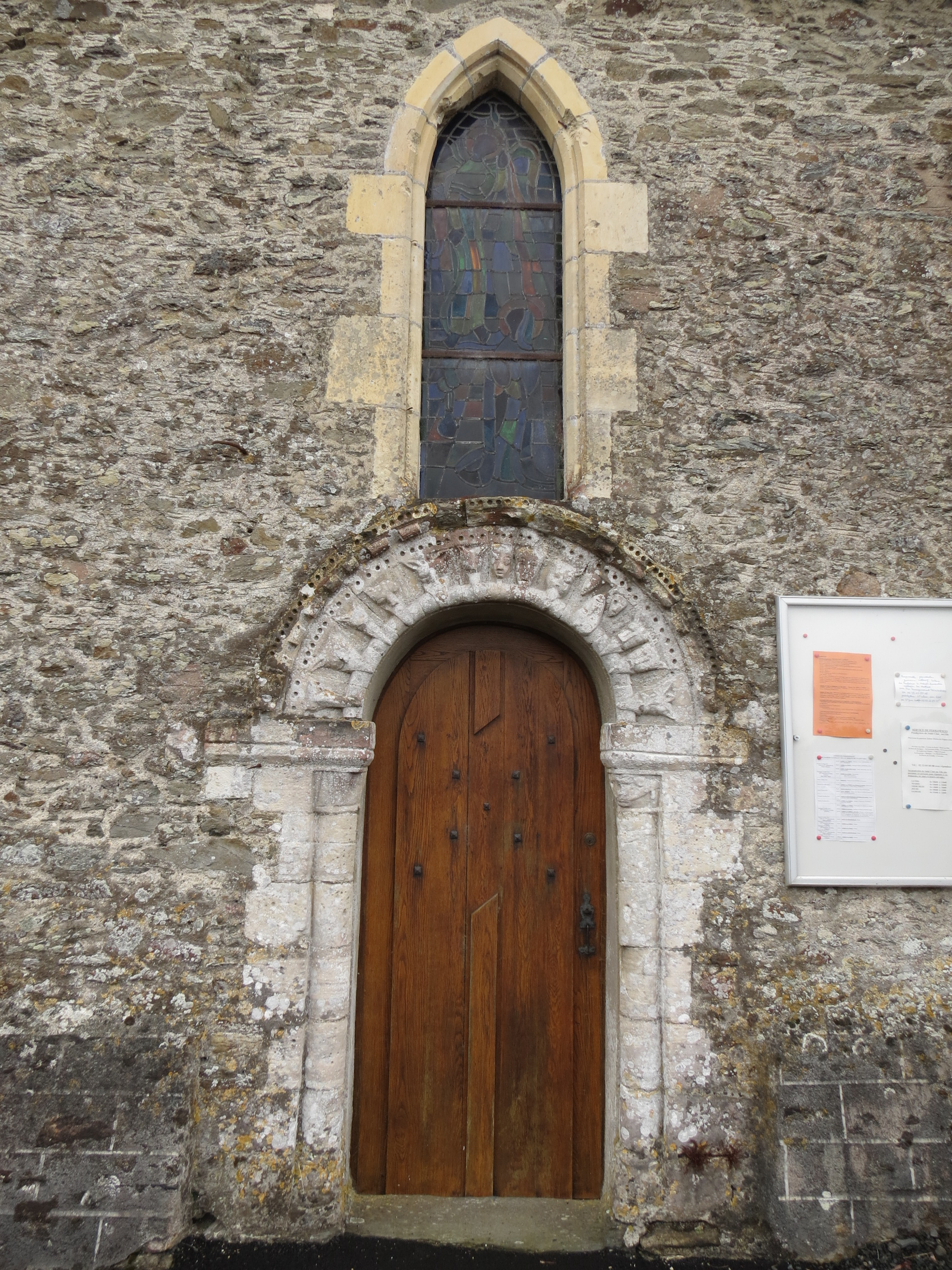 Eglise de Le Mesnil-Rouxelin, impacts de balles et d'éclats sur les rebords de fenêtres.